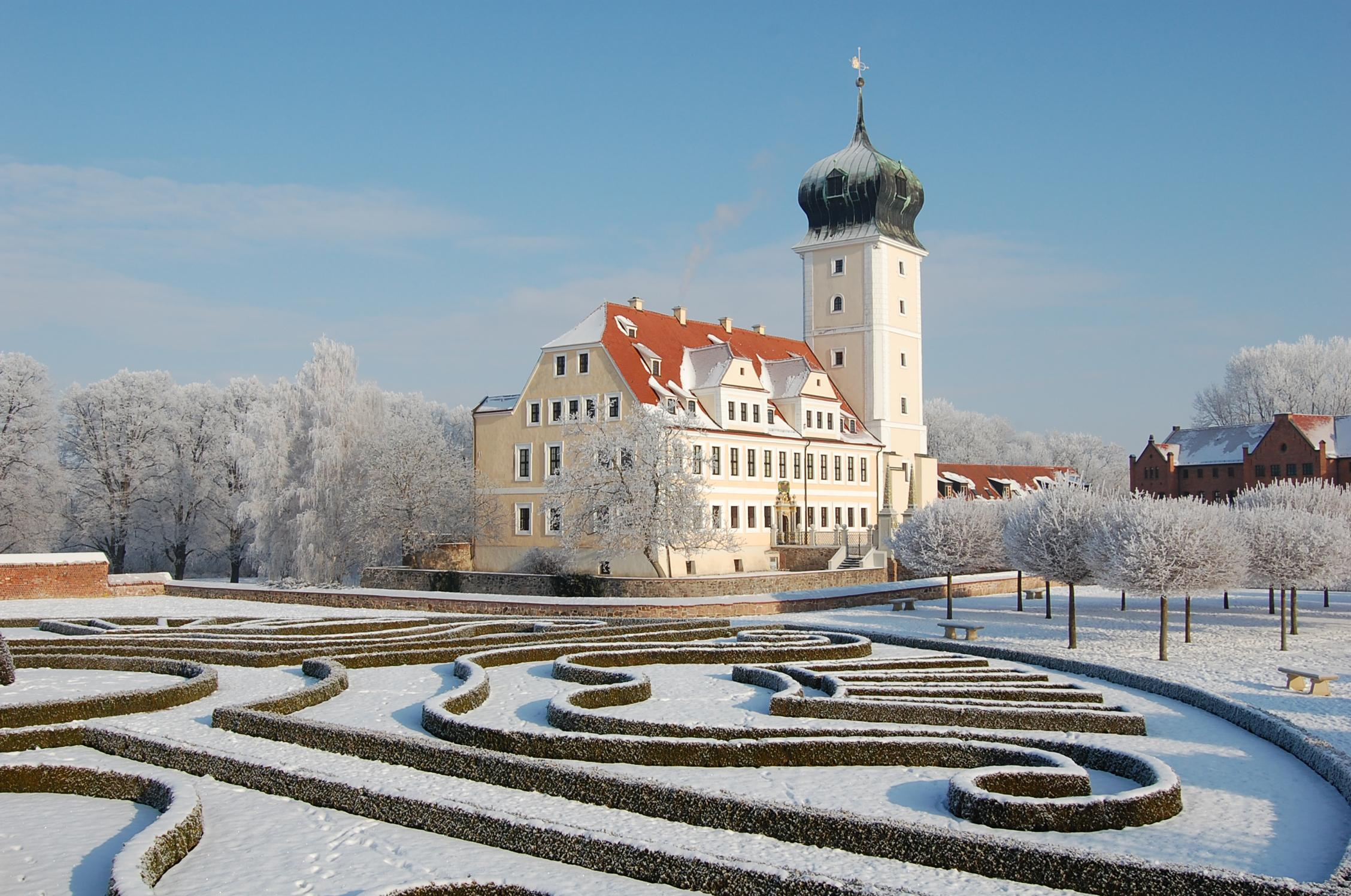 Barockschloss Delitzsch mit Barockgarten - Winterbild